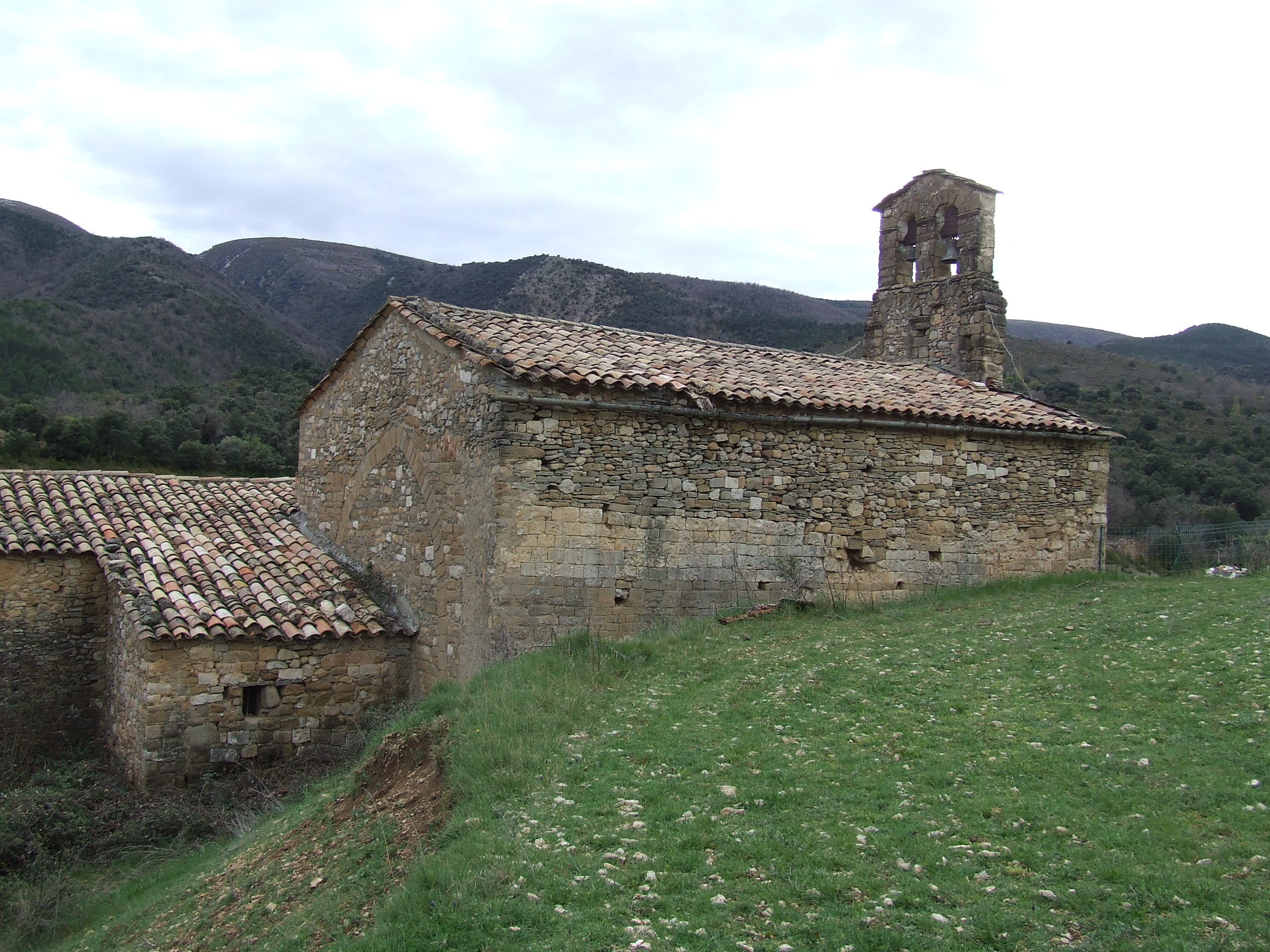 Murs nord i est de Sant Esteve de la Sarga (Pallars Jussà)